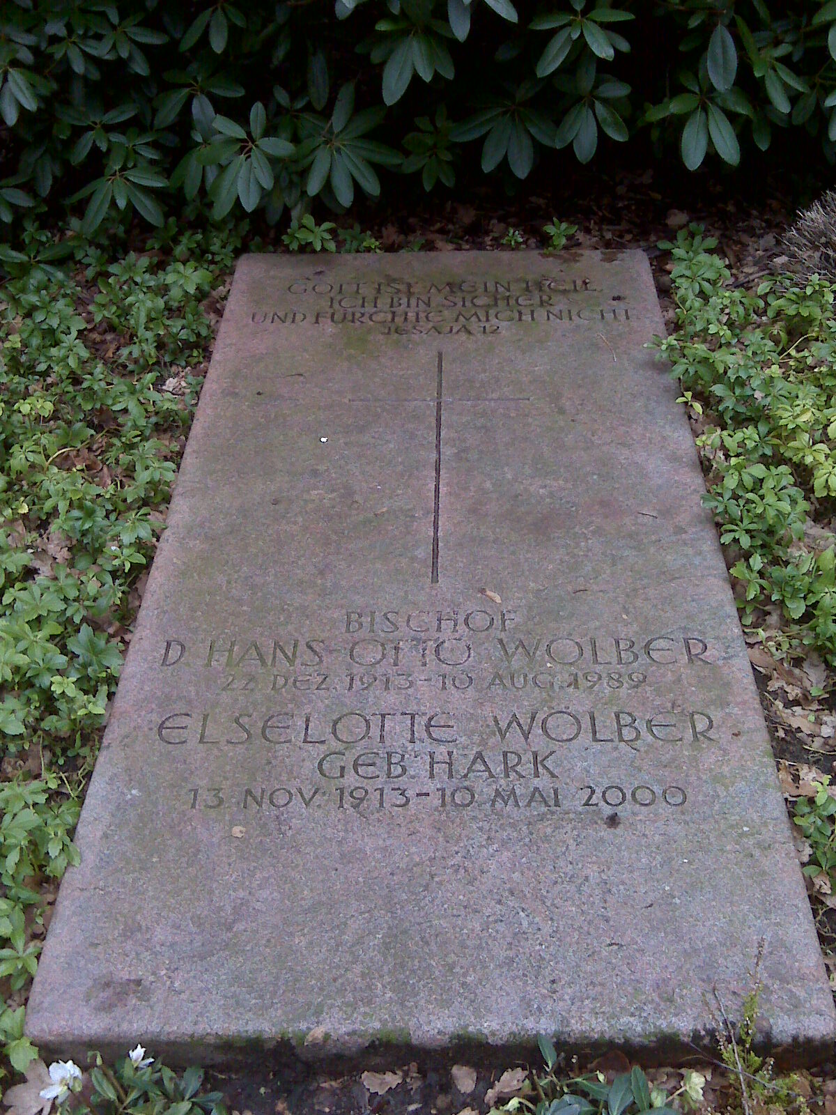 Grabplatte des Hamburger Bischofs